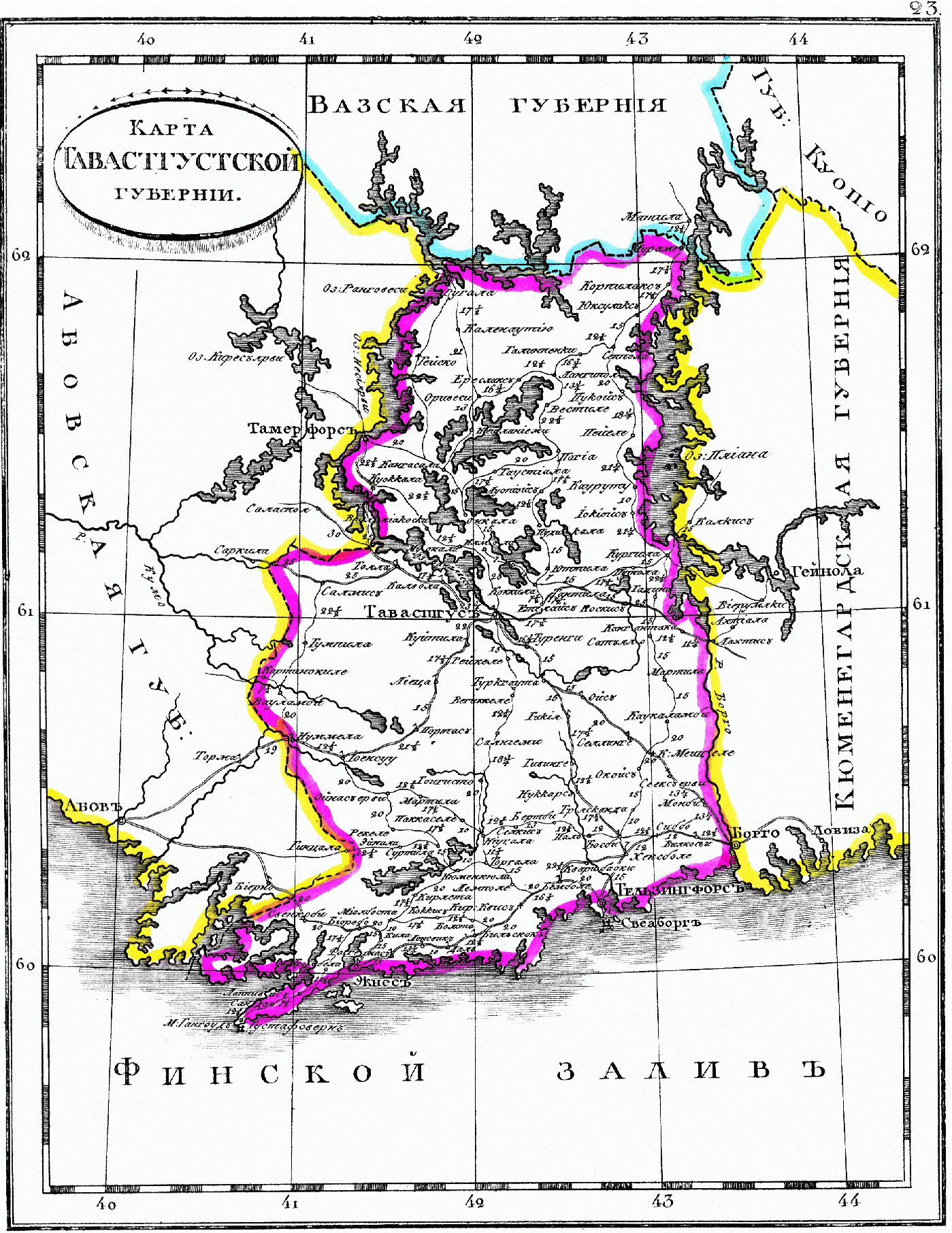 Карта Тавастгусской губернии Великого княжества Финляндского, 1835